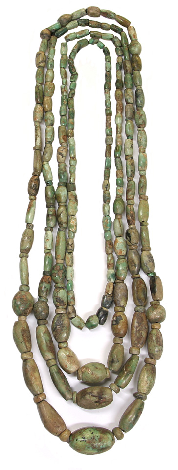 Collaret de denes de variscita de la necròpolis neolítica de la Bòbila Padró-Can Tiana (Ripollet), d'entre fa 6.000-5.000 anys (Museu d'Història de Sabadell).